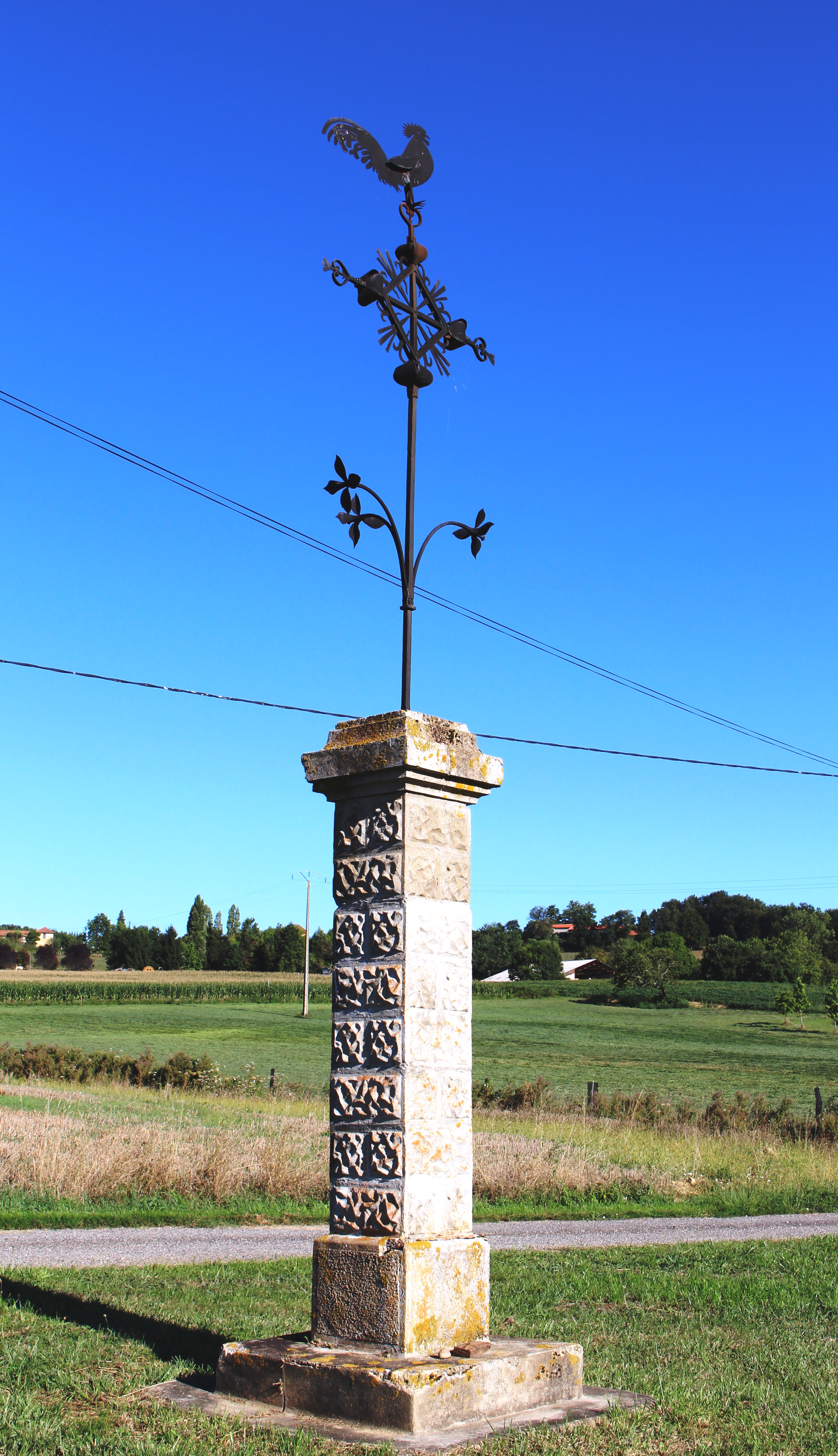 Croix de Puydarrieux (Hautes-Pyrénées)